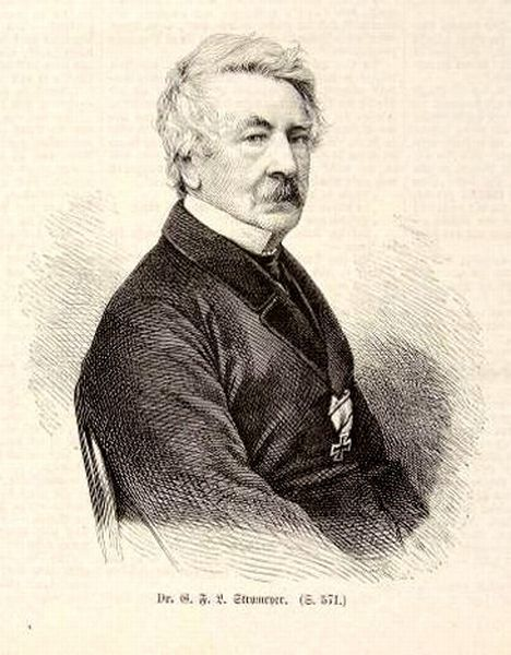 Text unter dem Bild: »Dr. G. F. L. Stromeyer.« Louis Stromeyer (1804-1876), Chirurg, Königl. Hannoverscher Hofchirurg, Medizinalrat, Hofrat. Porträt, halbe Figur sitzend, mit Orden. Holzstich 1876. 14×12 cm.